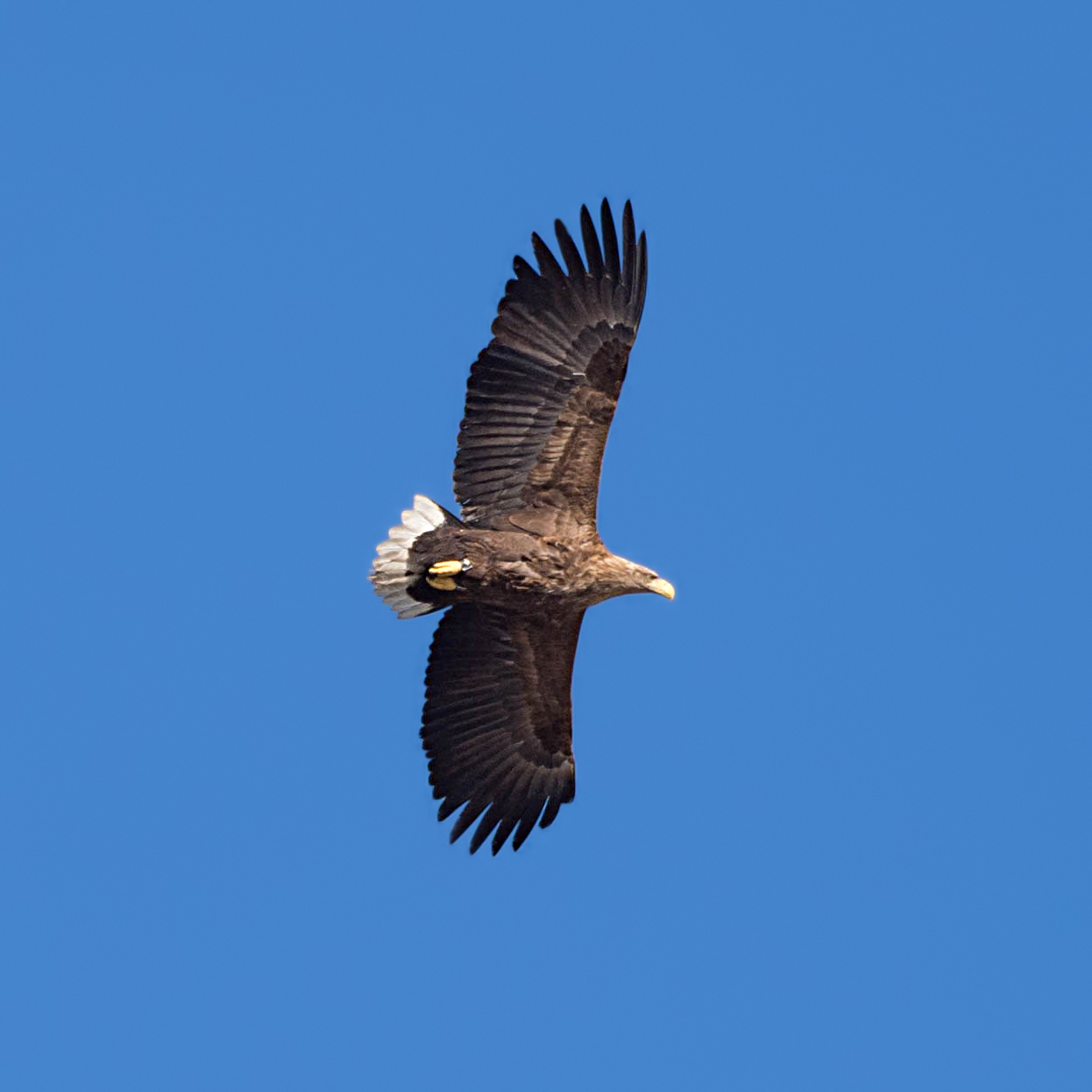 Havsörn, White-tailed eagle, Haliaetus albicilla, Djurgården, Stockholm, Sweden